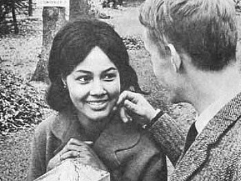 Fatima Svendsen och Gösta Ekman. Bilden är tagen utanför Karl Gerhards "Kråkslottet" i Saltsjöbaden